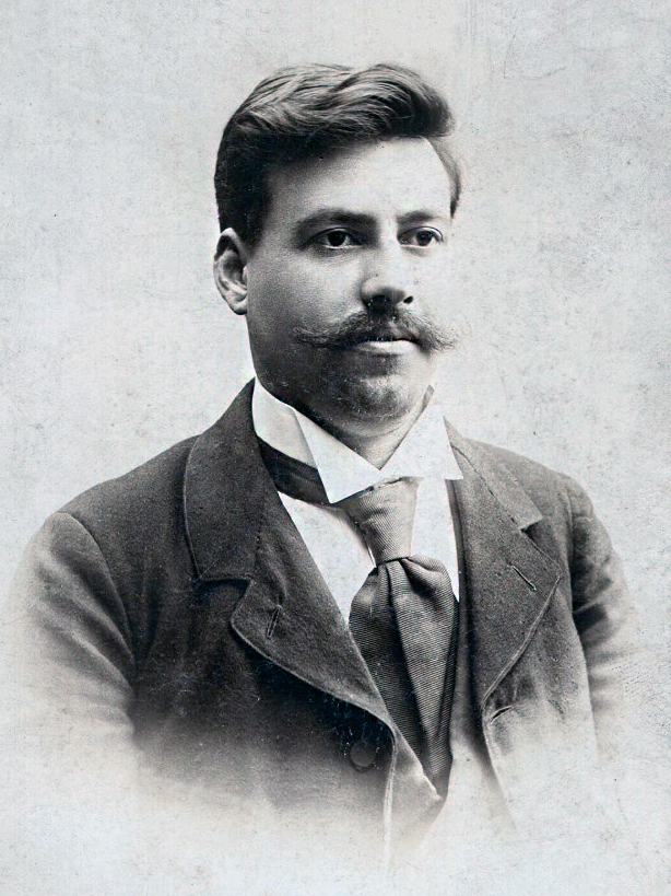 Gotze.jpeg